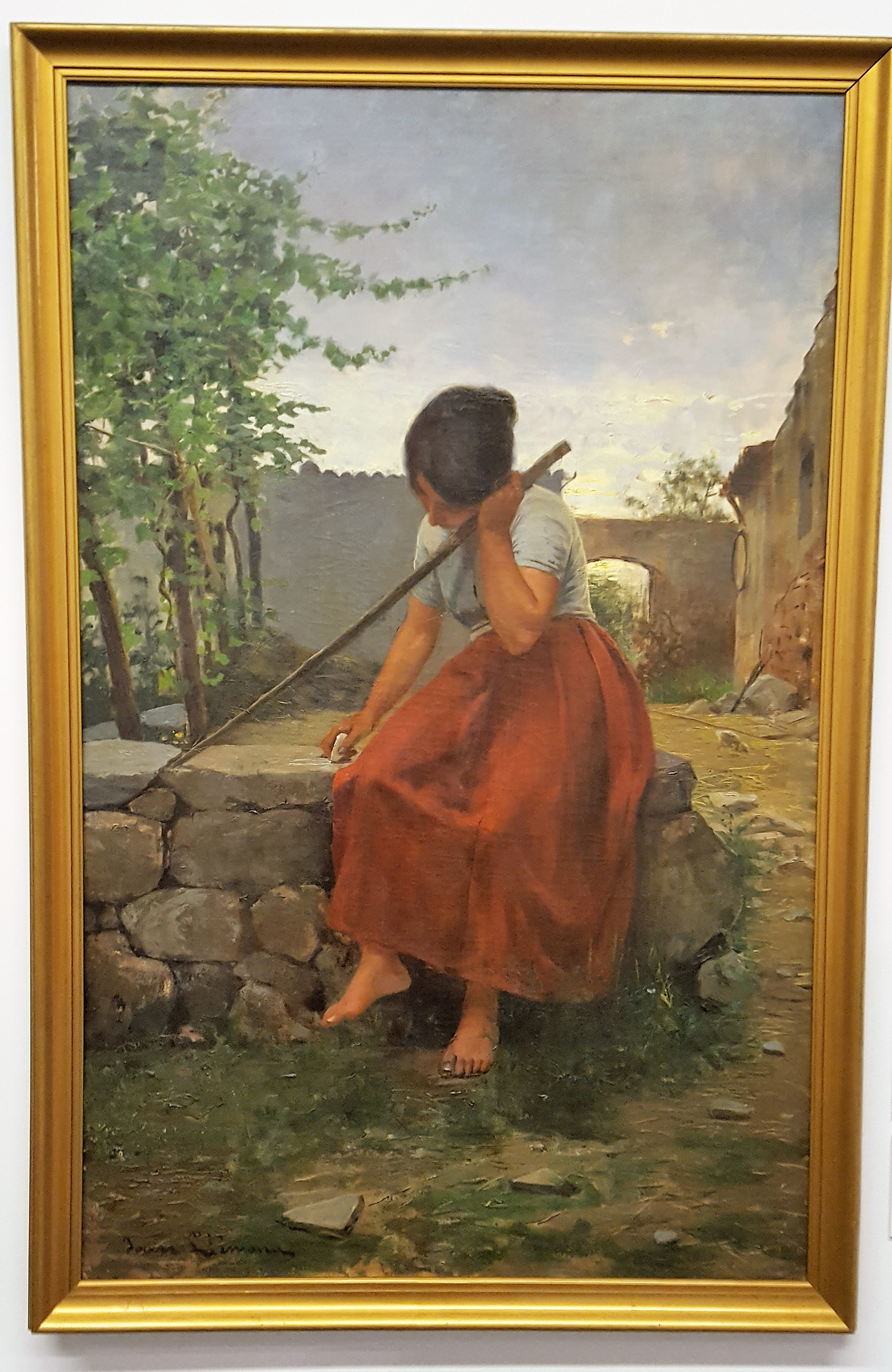 Joan Llimona i Bruguera: Pensativa (Die Nachdenkliche, zwischen 1890 und 1920, Öl auf Leinwand, Museu Comarcal de la Garrotxa, Olot)